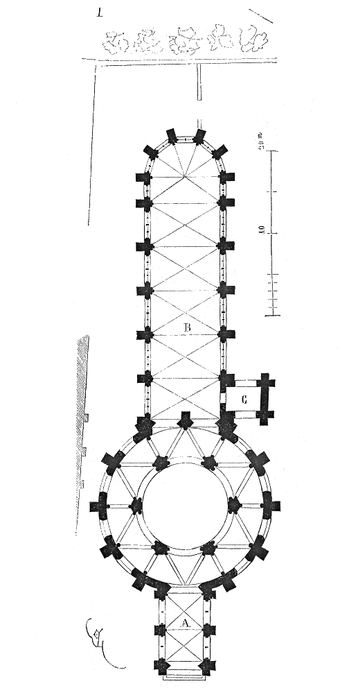 ... Réunissant les renseignements que nous avons pu nous procurer sur le Temple de Paris, nous donnons le plan de l'église (fig. 1). La rotonde datait de la première moitié du XIIe siècle. Après la sortie des templiers de la Palestine, cette rotonde fut augmentée au porche A, dont parle Sauval, et un peu plus tard de la grande nef B. Le bas du clocher C datait également du XIIe siècle, et l'étage du beffroi du commencement du XIIIe siècle ...